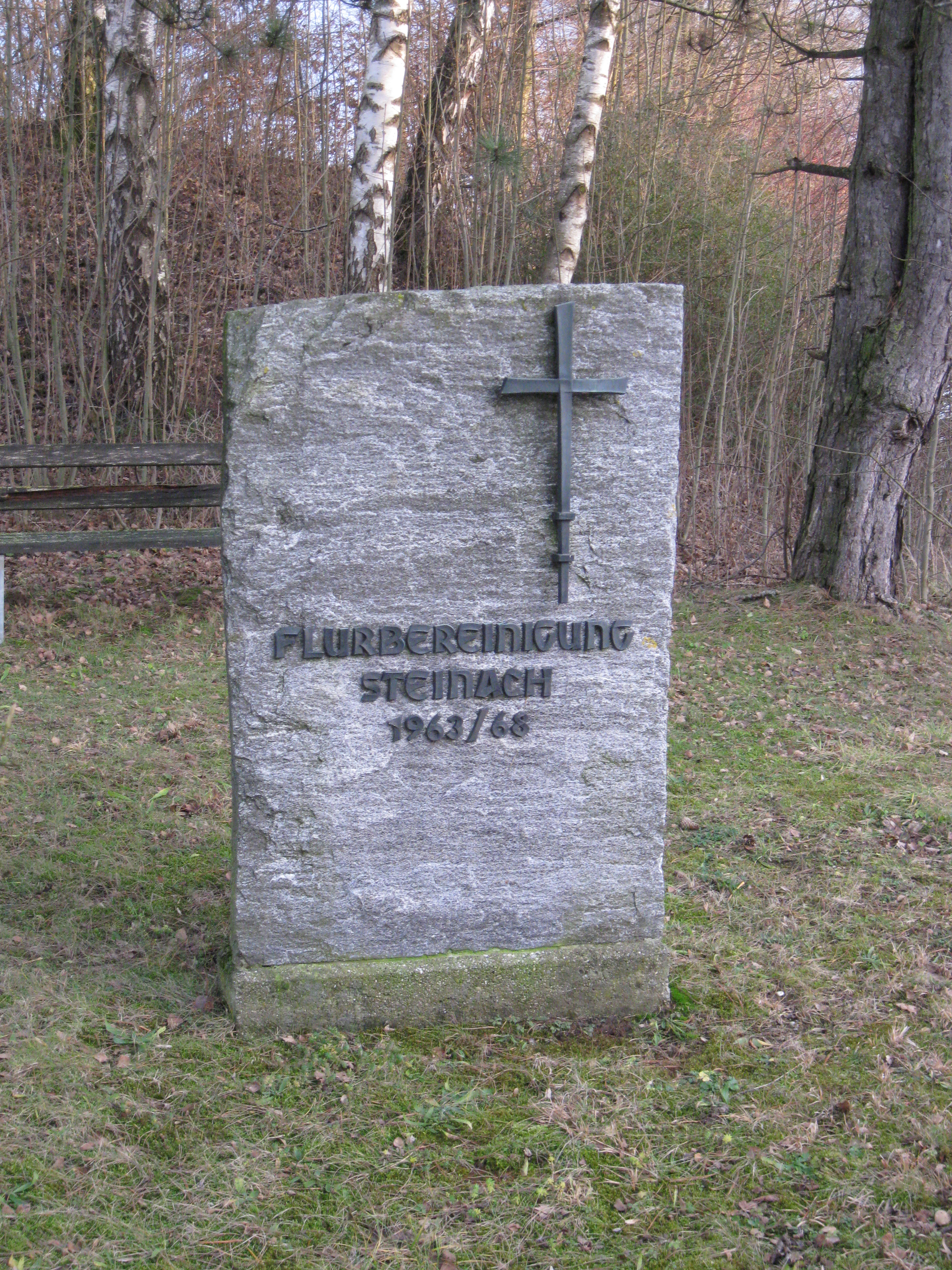 Steinach, Bayern - Denkmal für die Flurbereinigung in den 1960er-Jahren